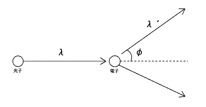 コンプトン効果の概念図